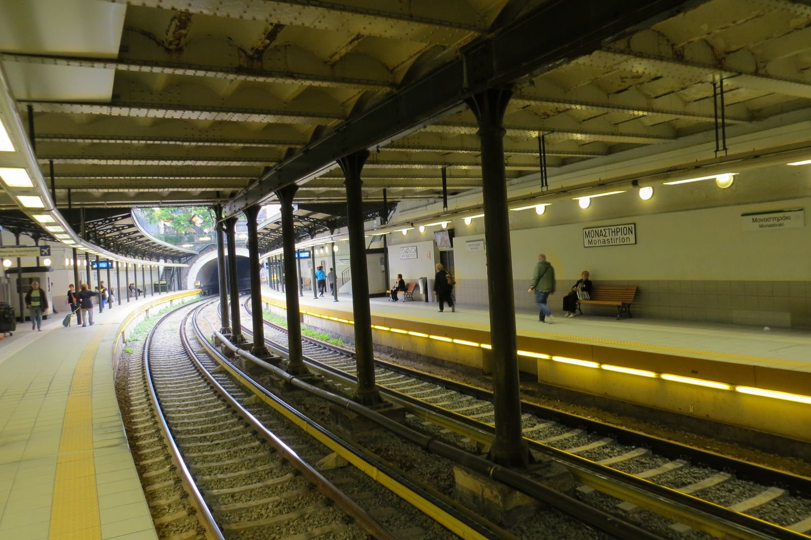 Monastirion